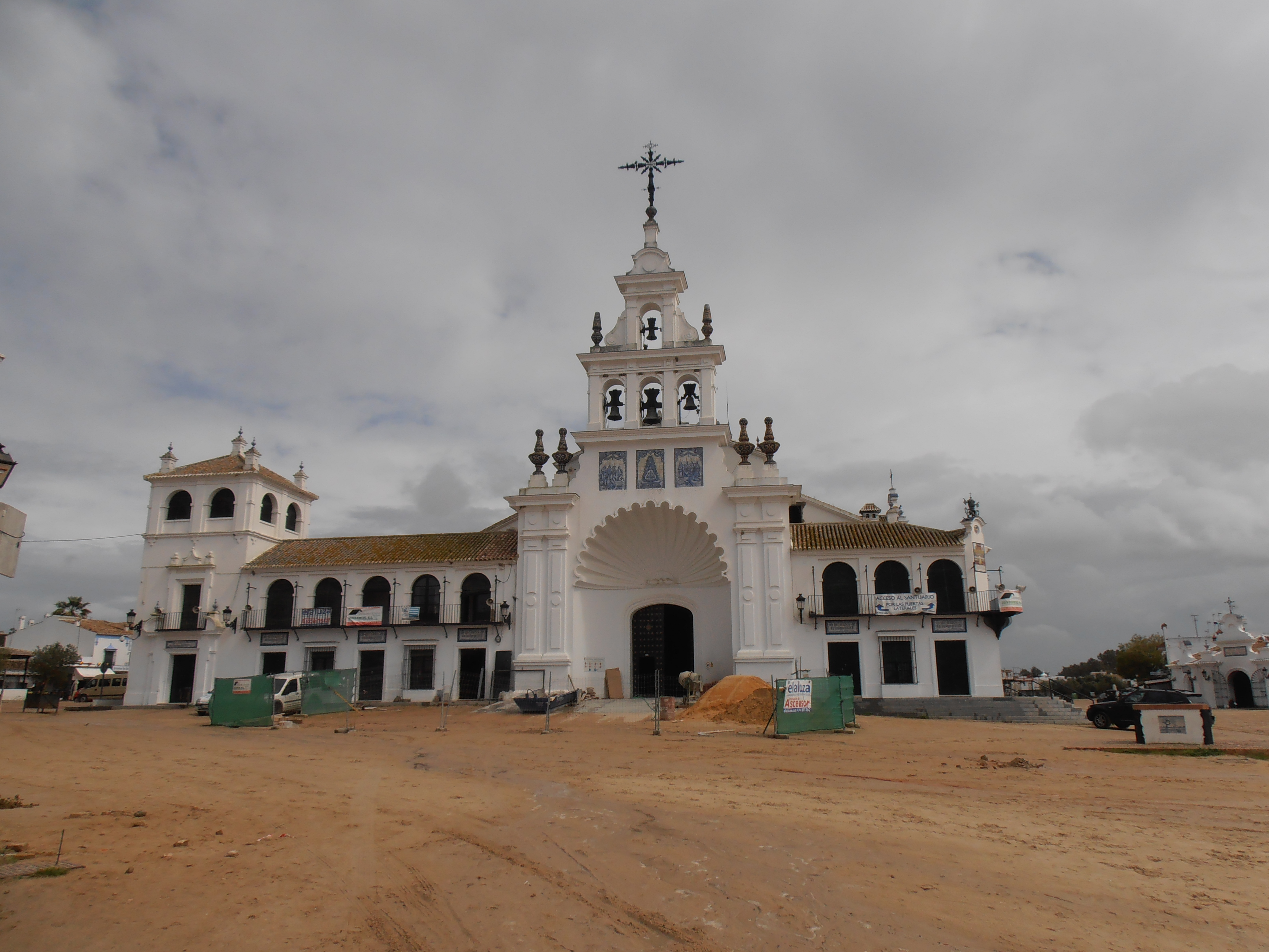 Ermita del Rocio